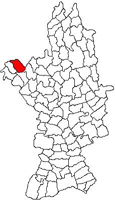 Categorie:Hărţi ale judeţului Olt